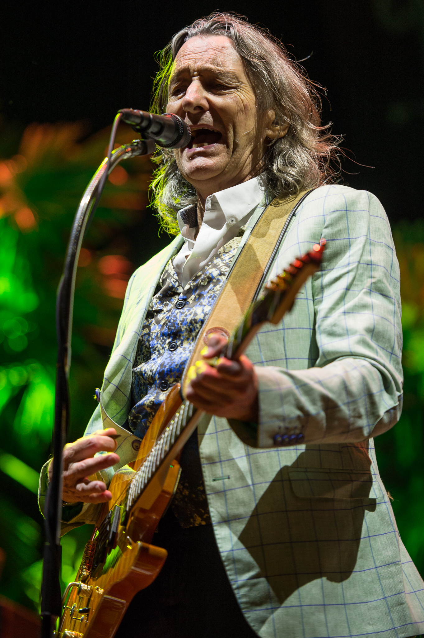 Brombachsee,Concertbüro Franken,Festival,Konzert,Lieder am See,Livekonzert,Livemusik,Musik,Roger Hodgson